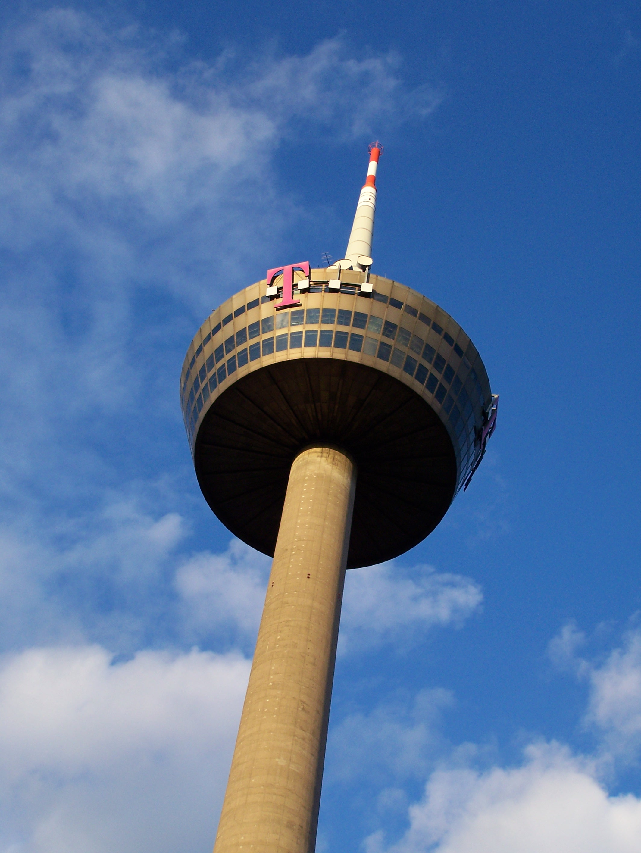 Der Colonius ist mit seinen 266 Metern Höhe der höchste Fernmeldeturm in Nordrhein-Westfalen und der siebthöchste Fernmeldeturm in Deutschland.